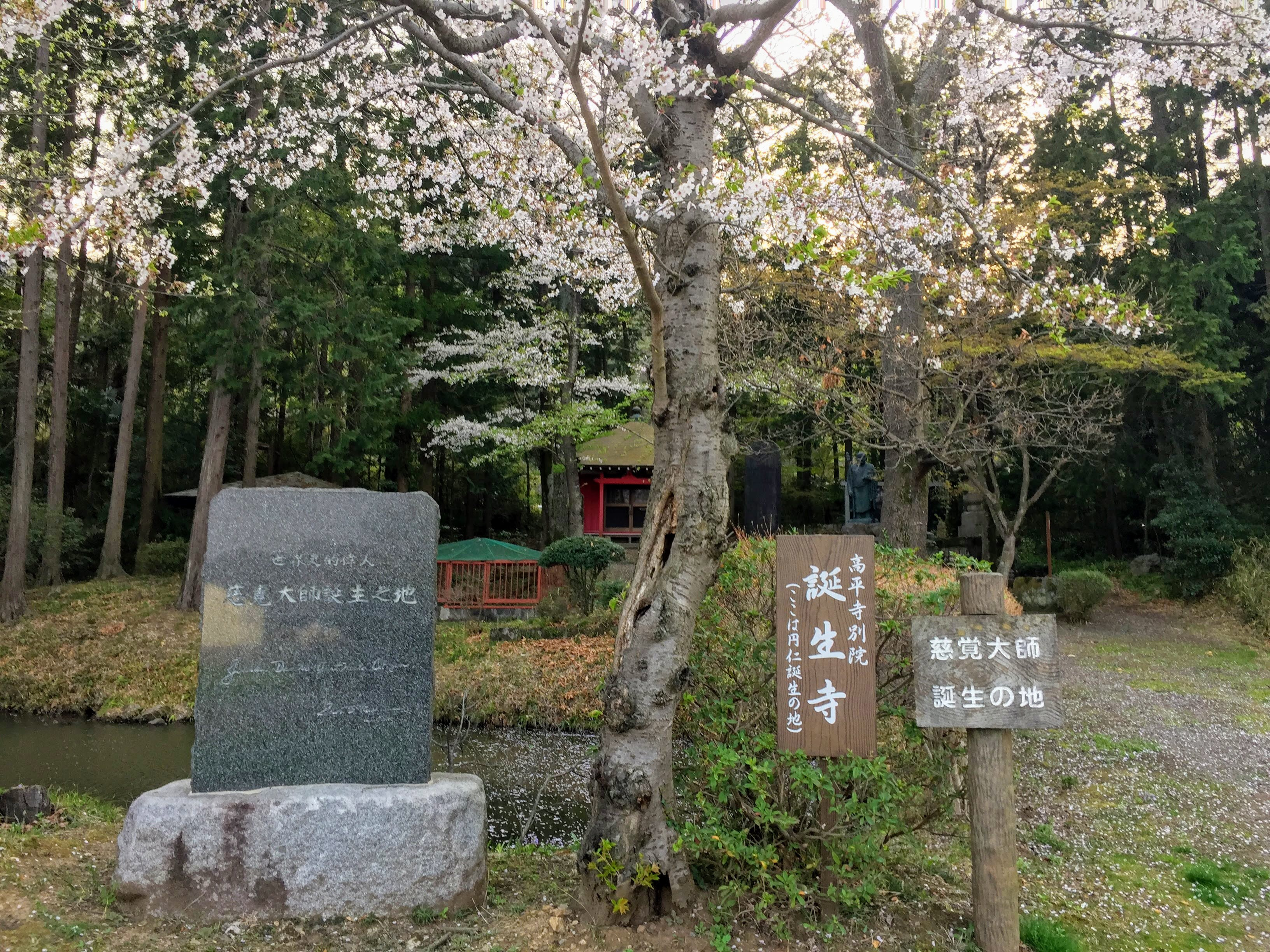 栃木県栃木市岩舟町下津原にある、慈覚大師円仁誕生の地とされる場所。高平寺別院、誕生寺。